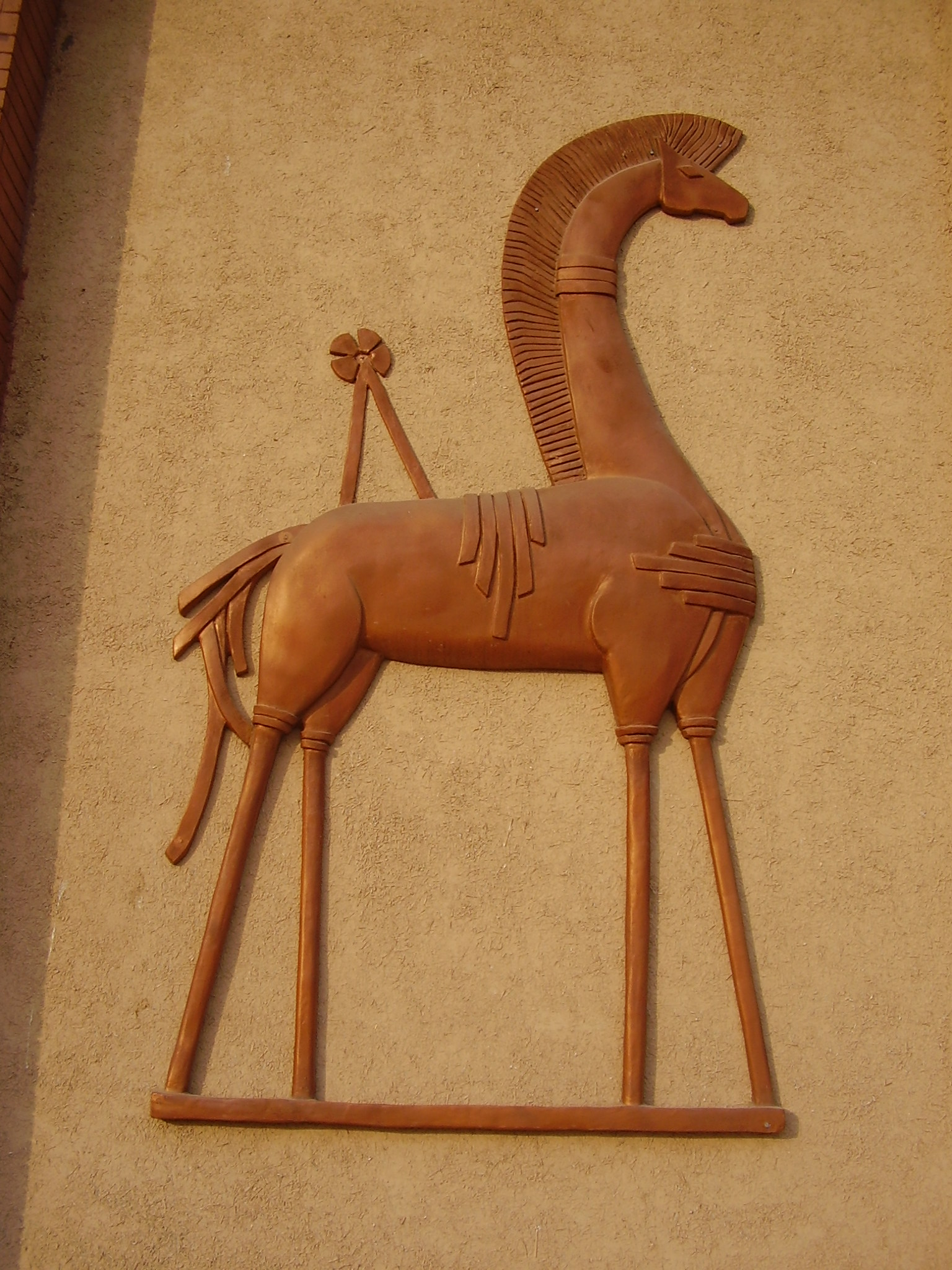 Logo of lok virsa museum